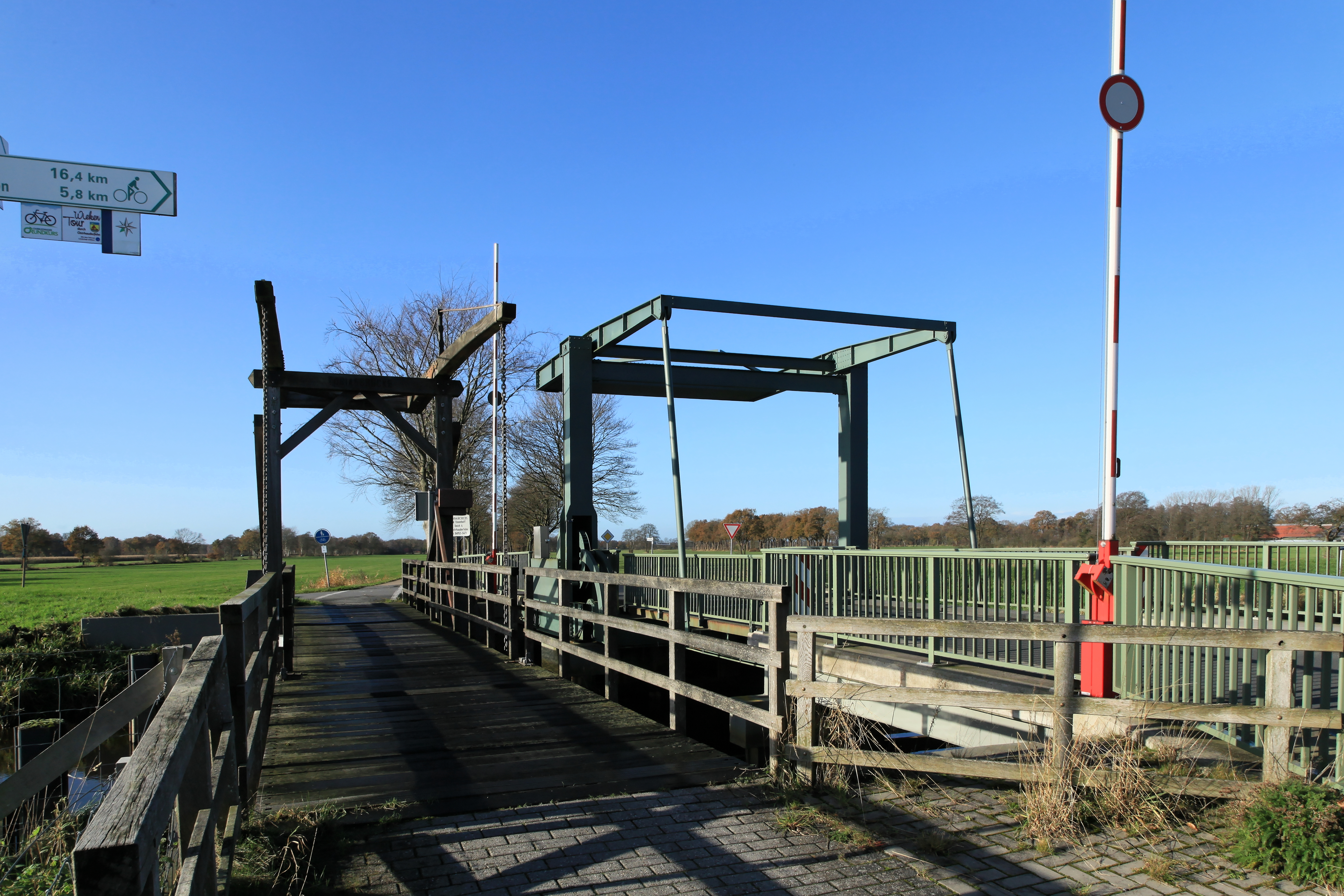 Tobiasbrücke über den Hauptfehnkanal zwischen Rhauderfehn und Ostrhauderfehn